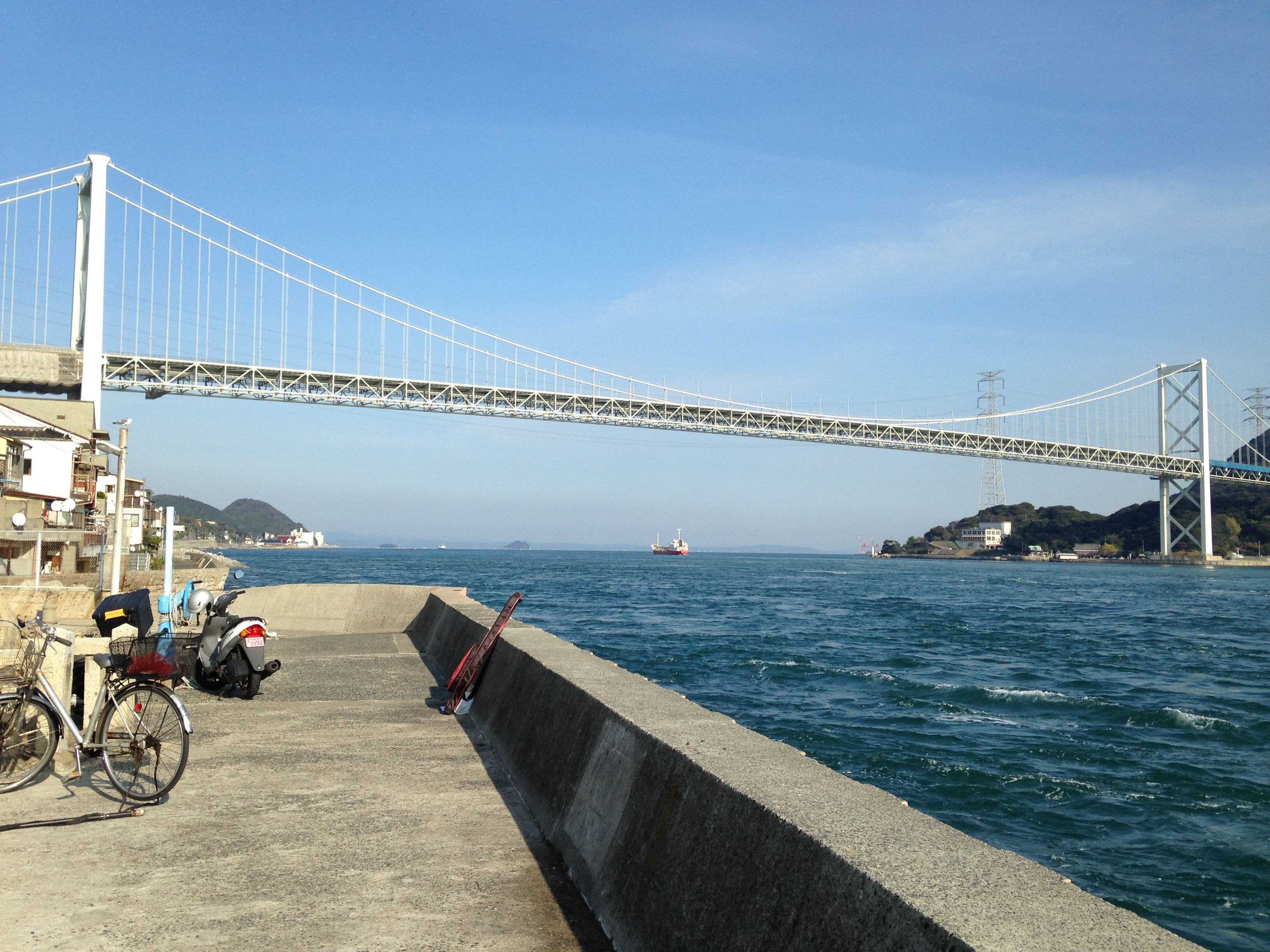 壇ノ浦漁港より望む関門橋